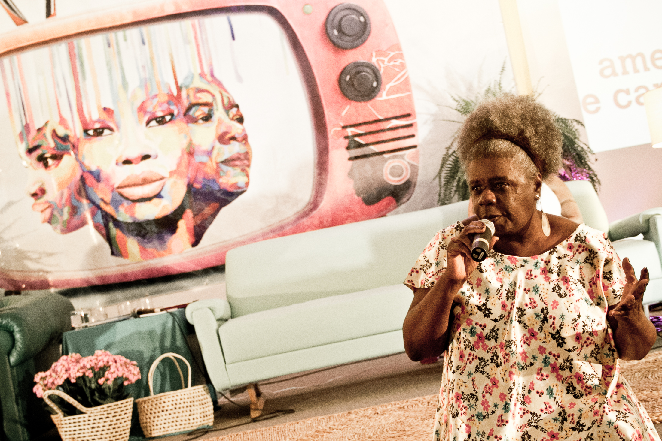 A escritora Conceição Evaristo durante debate no Festival Latinidades 2013